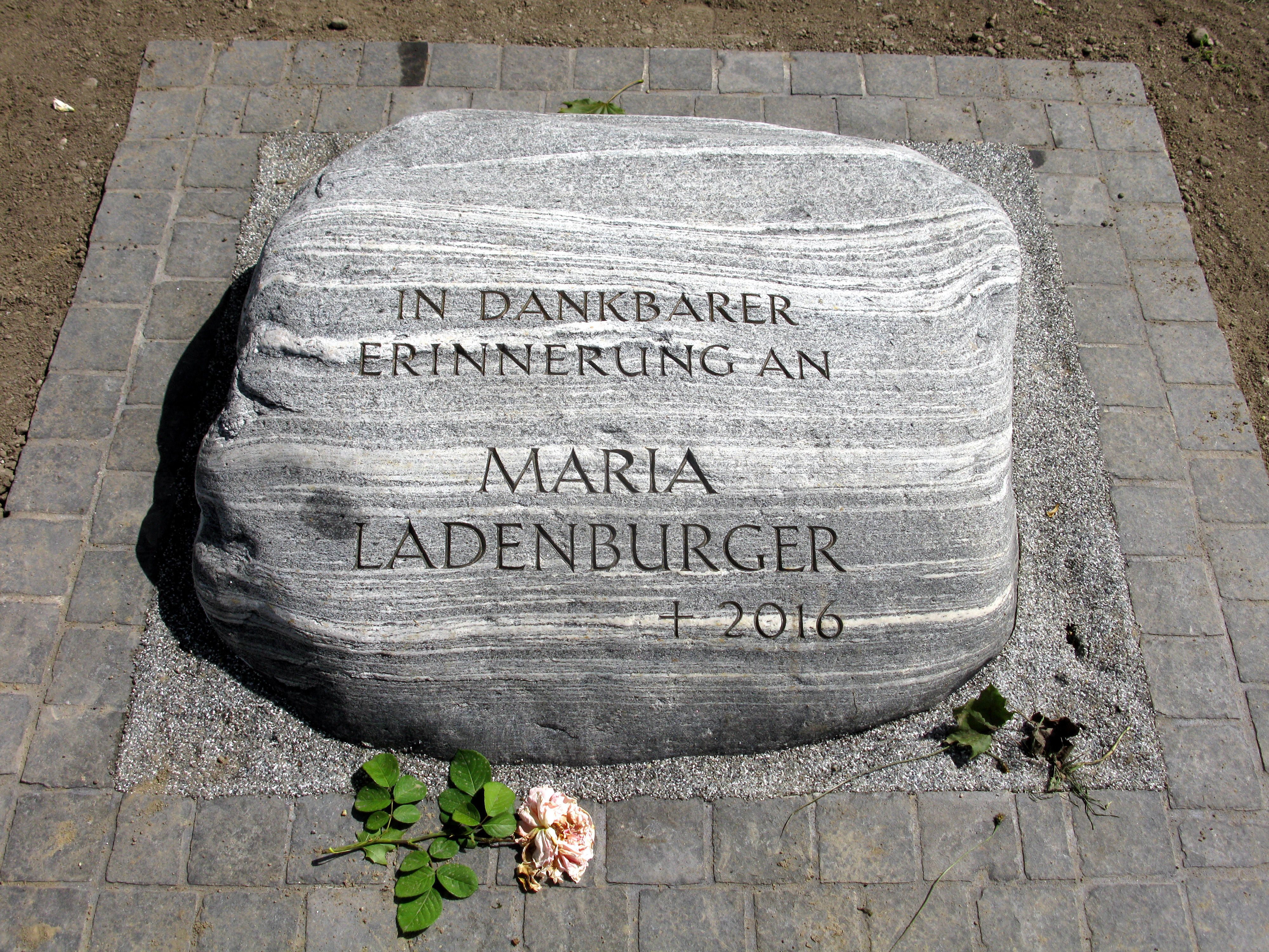 Gedenkstein für die 2016 ermordete Maria Ladenburger unweit des Tatorts an der Dreisam in Freiburg